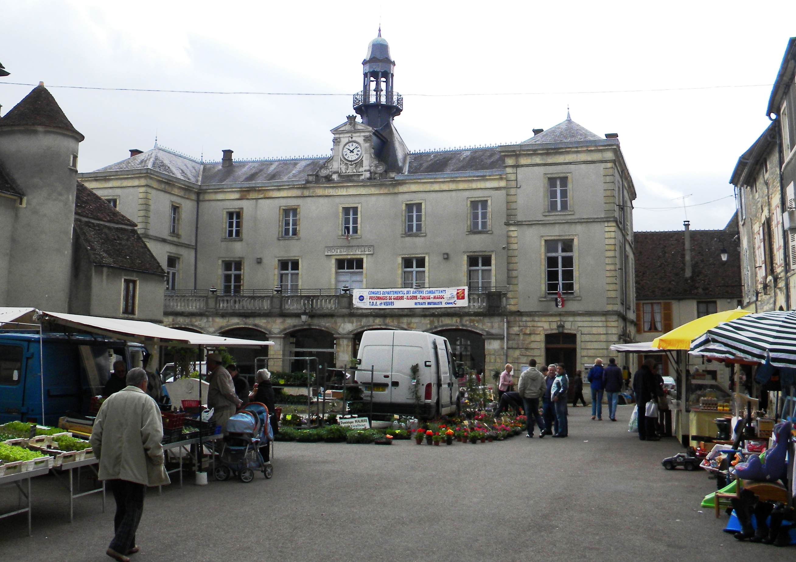 Urbodomo de Tannay